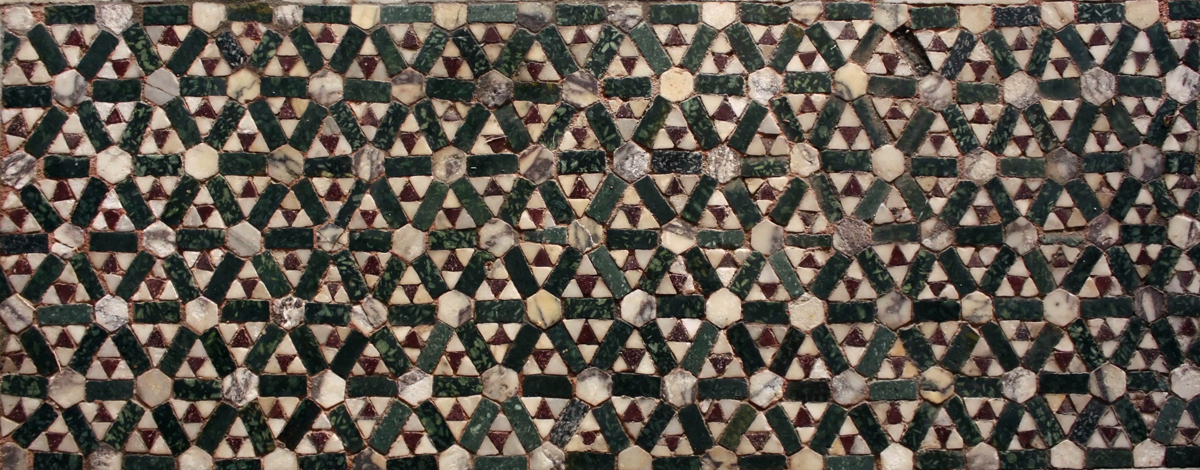 Pavement de la cours du Ca' d'Oro à Venise.